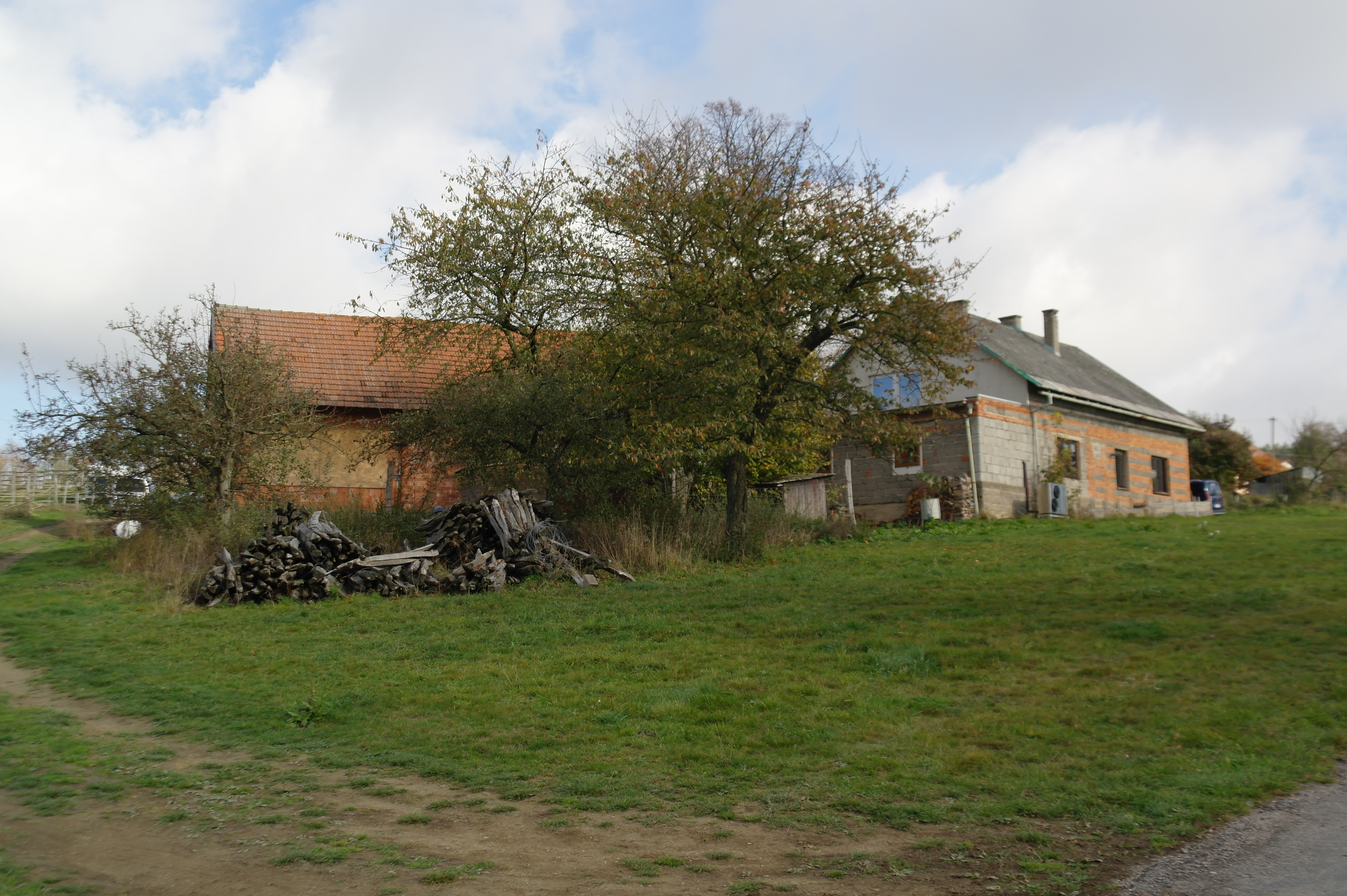 Domy ve vesnici Křižánky, Pardubický kraj Project: Fotíme Česko